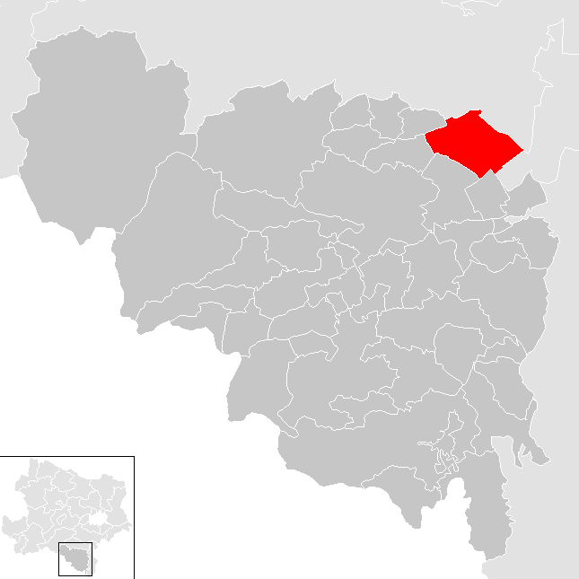 Bezirk Neunkirchen